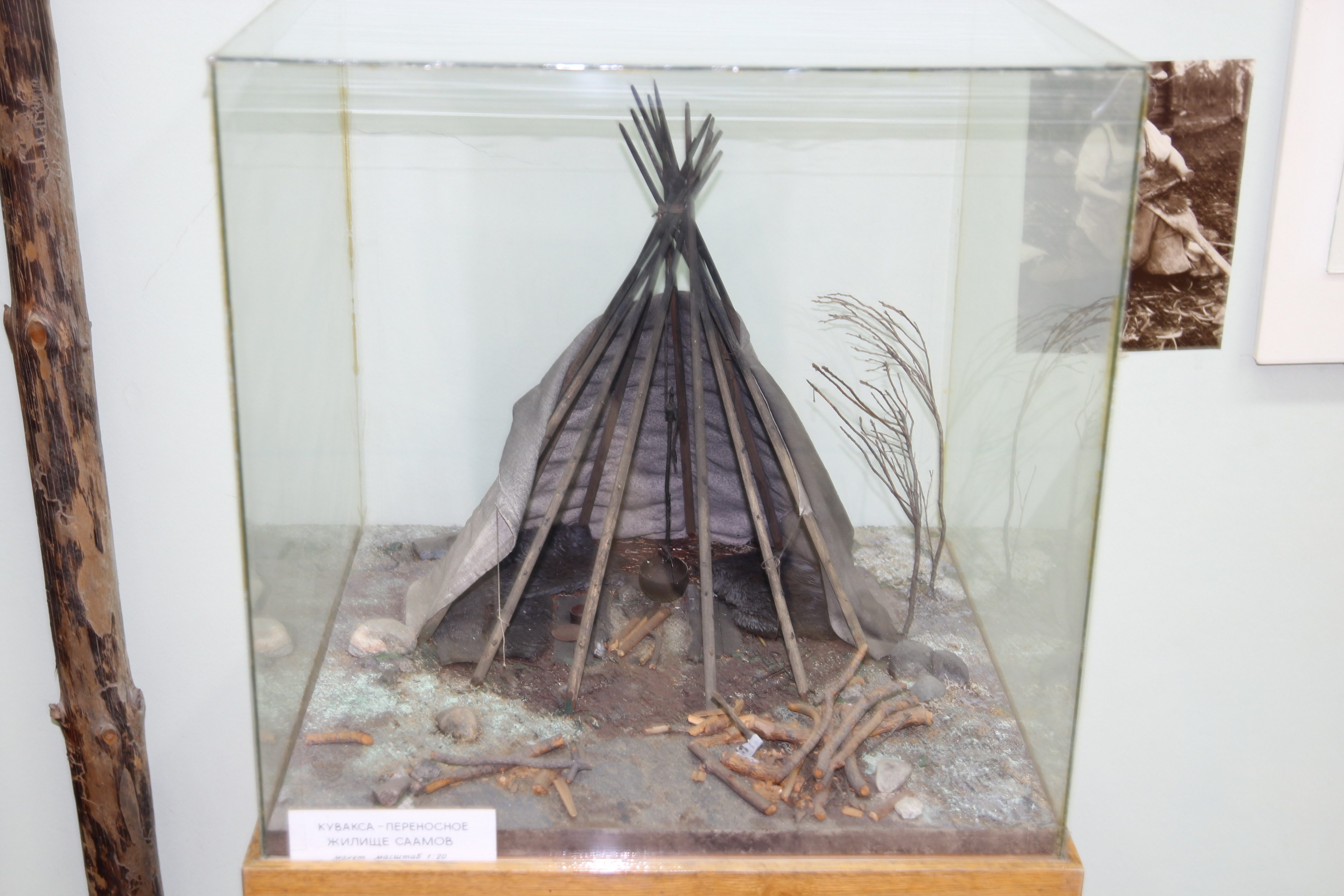 Кувакса